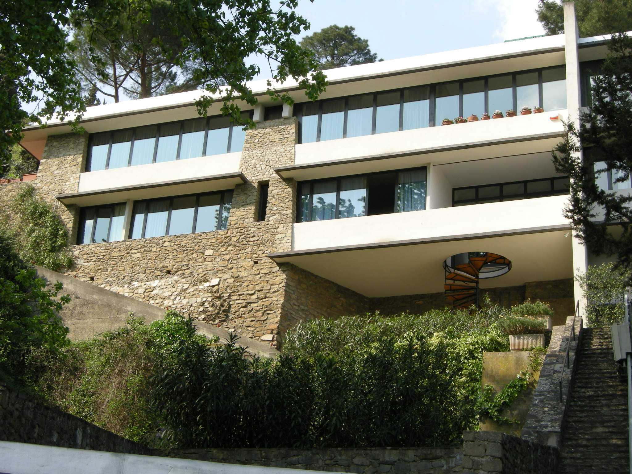 Complesso di monterinaldi